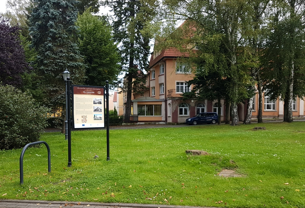 Tablica retro informacyjno-historyczna, w tle byłe sanatoria Lechia, po prawej Połczynianka i dom Levych